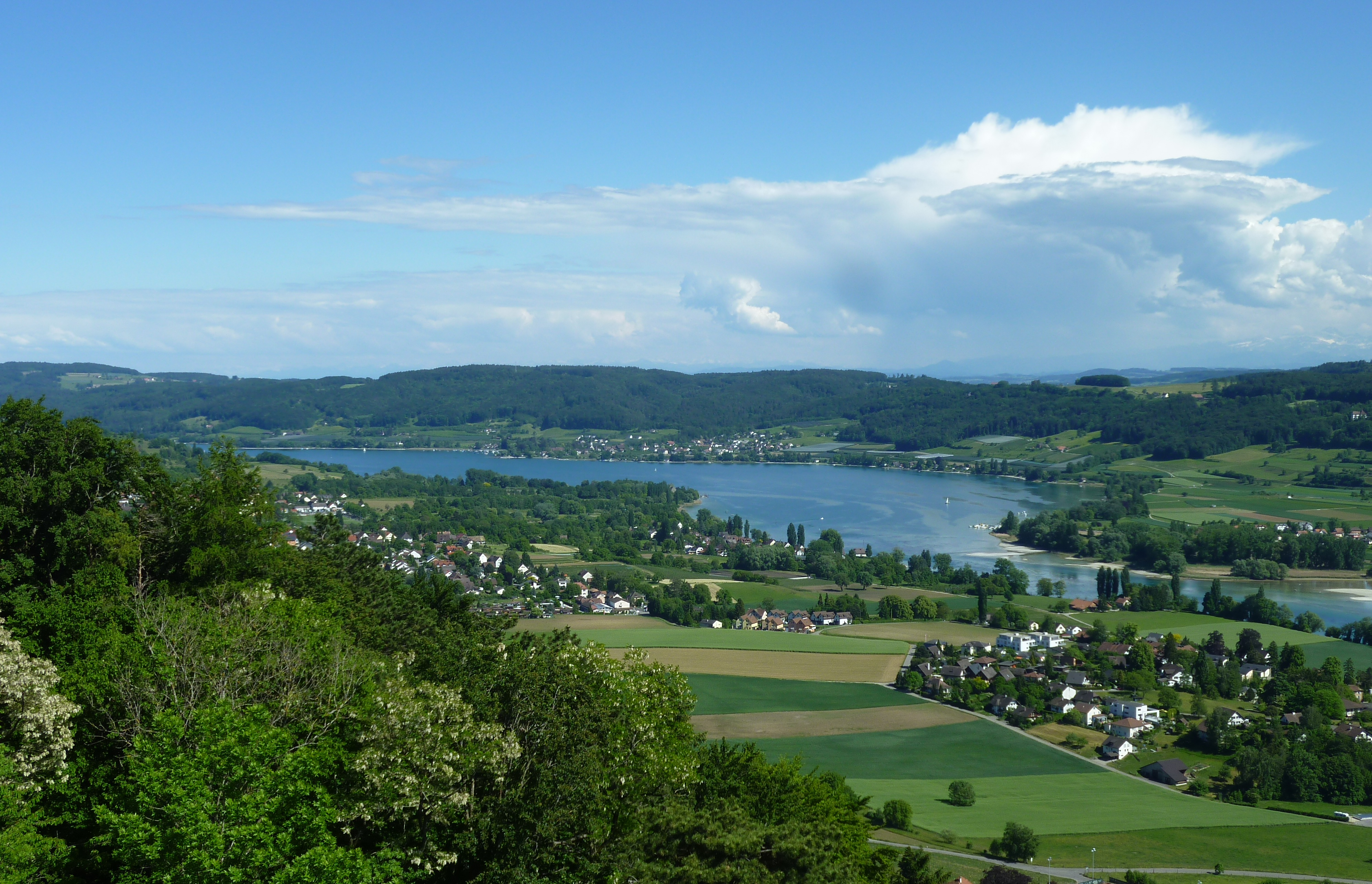 Untersee von Westen